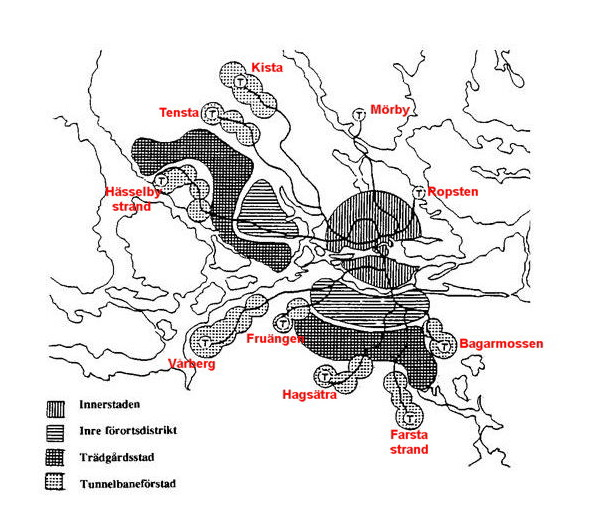 Generalplan för Stockholm 1952, de röda tunnelbanestationerna är inlagda i efterskott av Holger Ellgaard